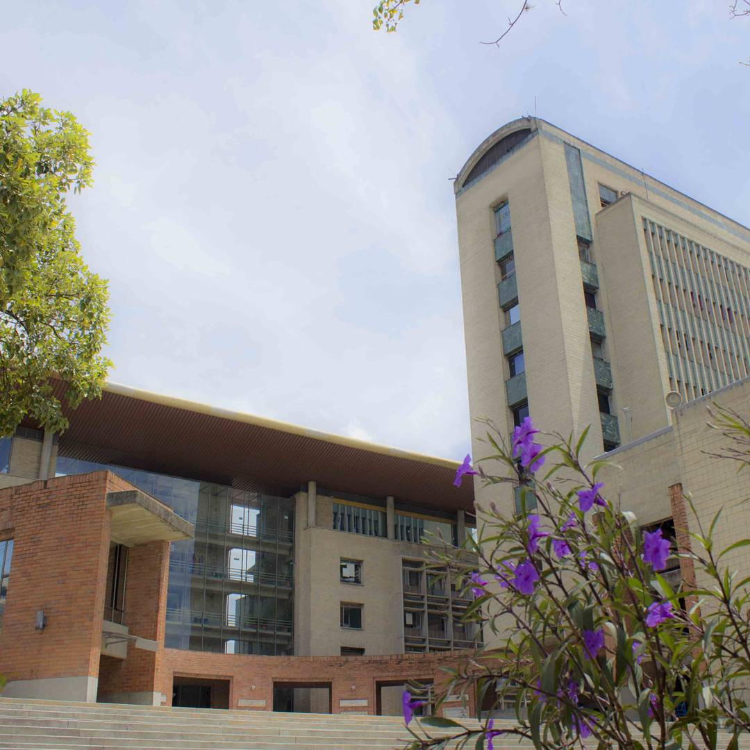 Foto Centro Administrativo Municipal de Itagüí CAMI, sede del gobierno lócal